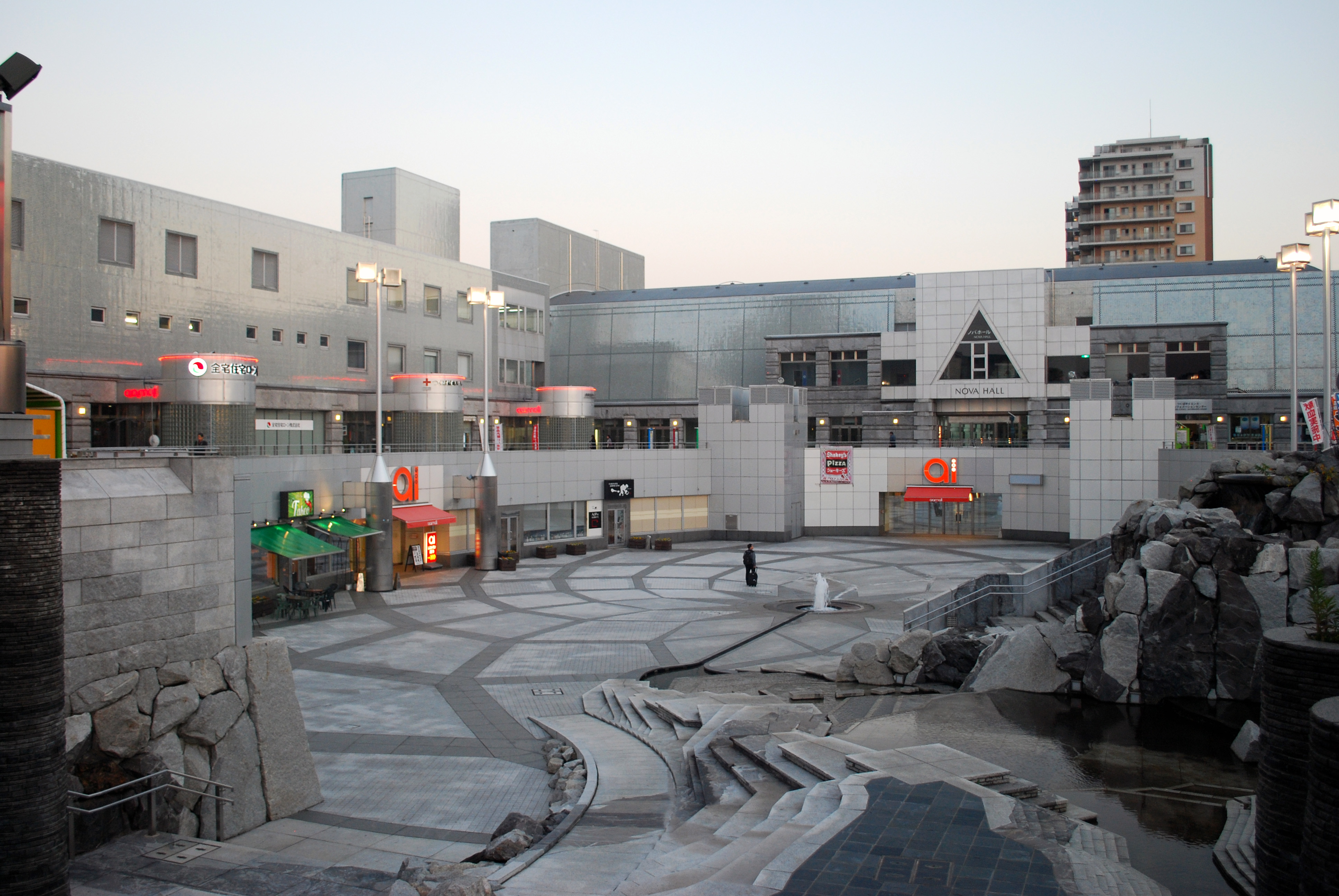 Nova Hall, Tsukuba, Japan